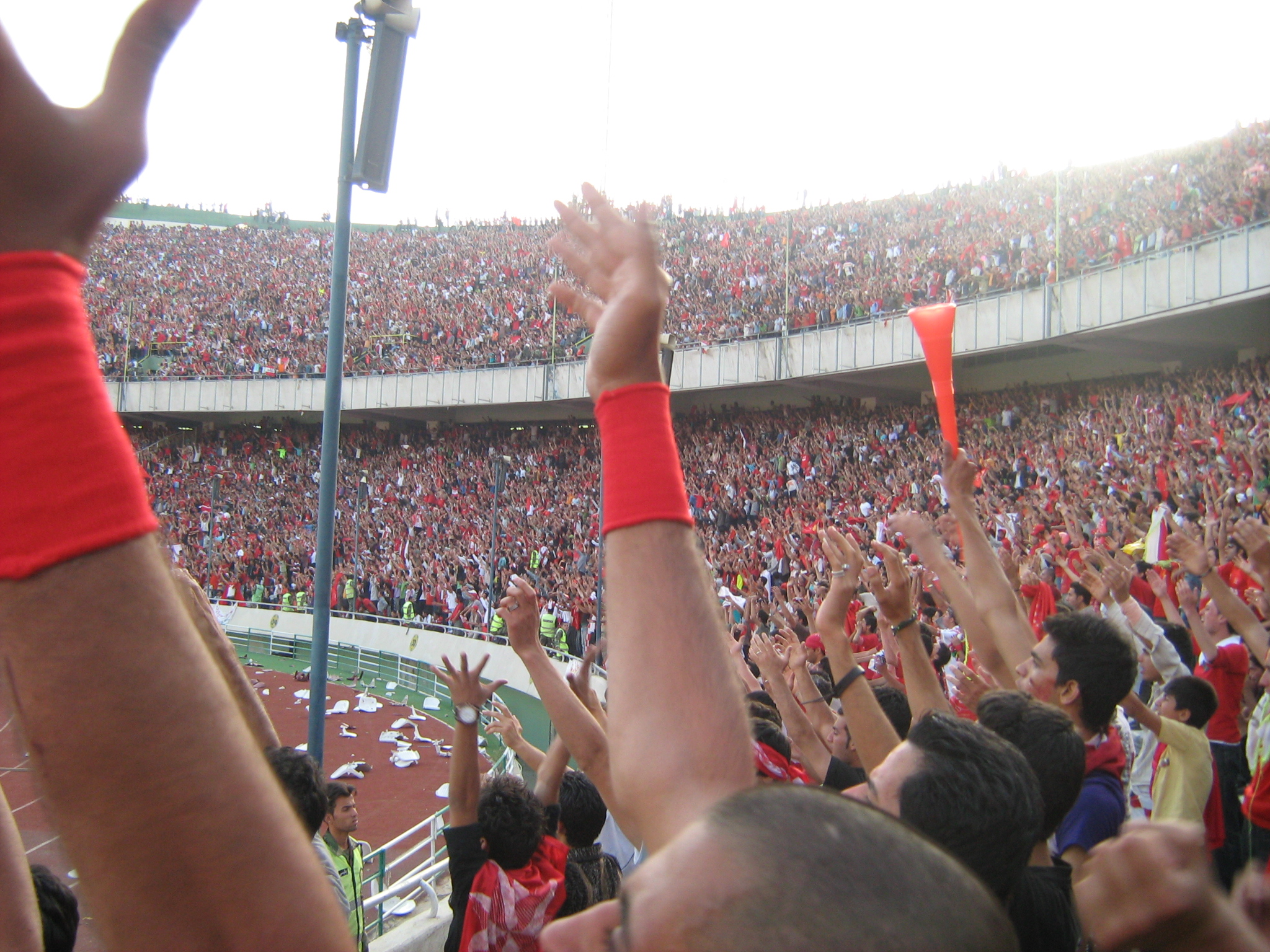 17. Mai 2008: "We are the Champions".